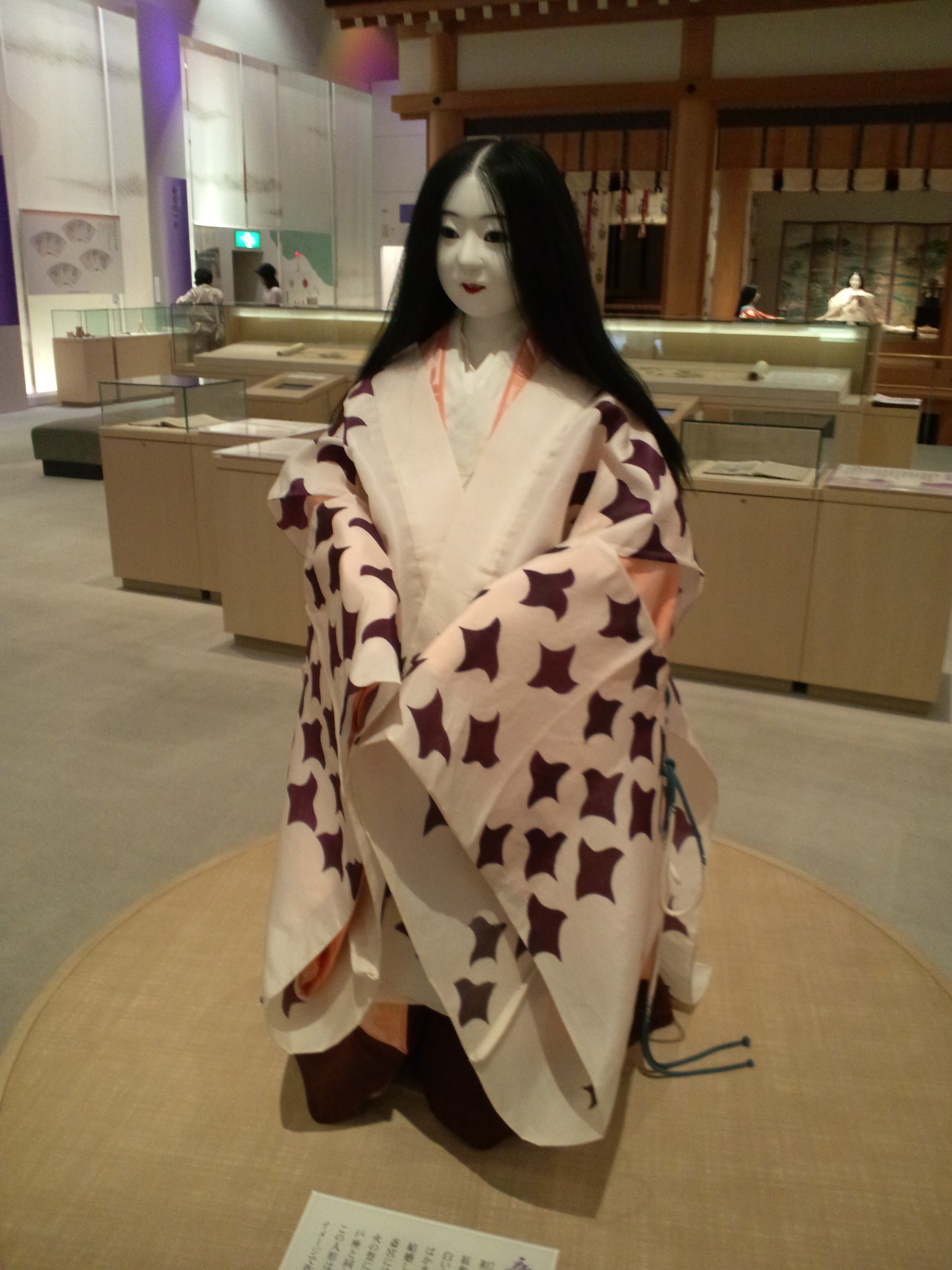 斎宮歴史博物館 展示物 童女人形「衵」